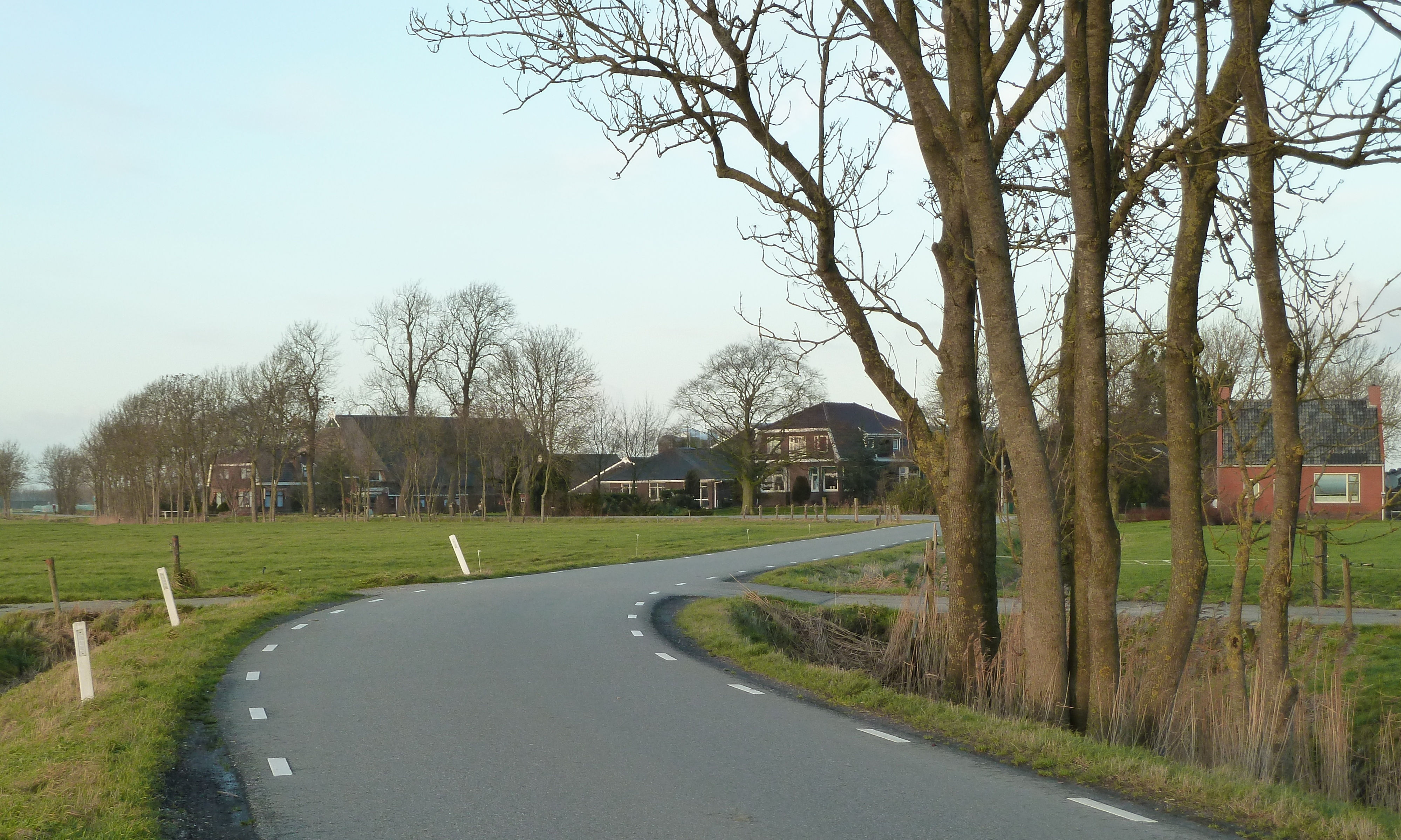 Gezicht op Achter-Thesinge vanaf de richting Thesinge